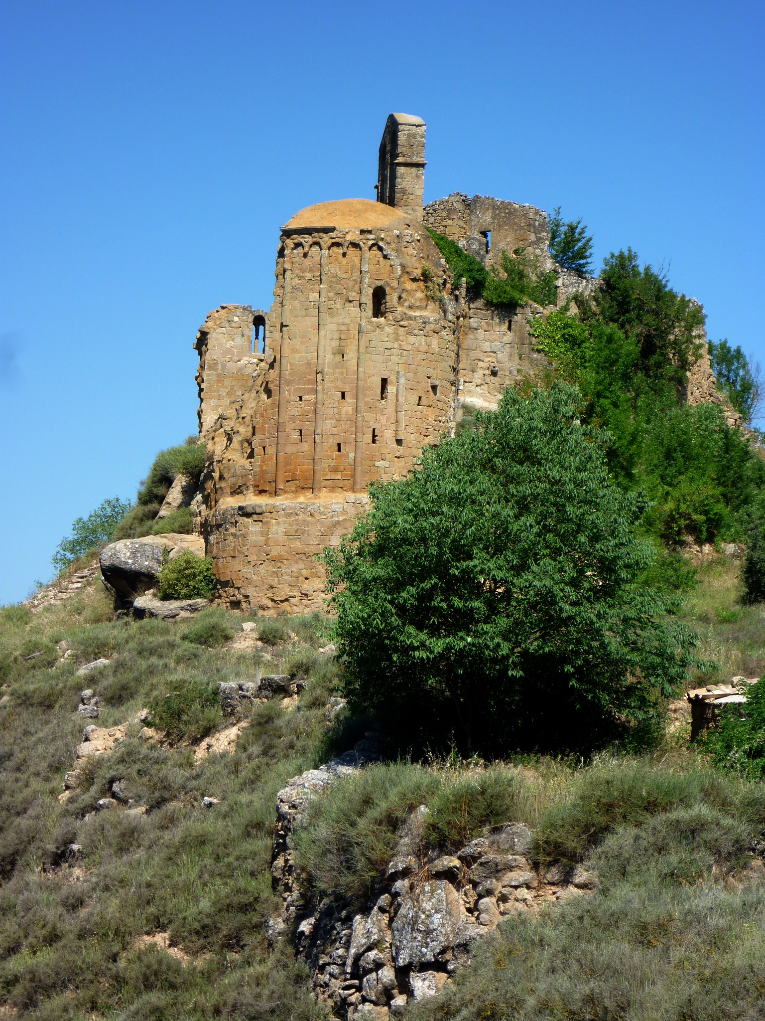 Absis de l'església de Sant Pere de Madrona (Pinell - Solsonès) This is a a photo of a natural area in Catalonia, Spain, with id: ES5130027